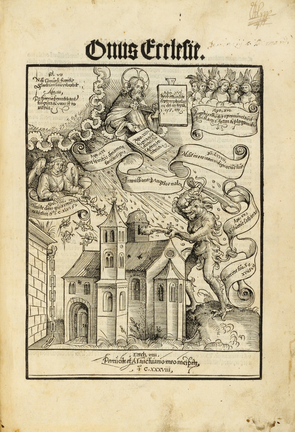 Titelblatt von: Onus ecclesie. Landshut: Johann Weyssenburger, 1524. Anonym veröffentlicht. Autor: Berthold Pürstinger (1465–1543), Bischof von Chiemsee, 1519; Bridwell Library, SMU, Dallas.